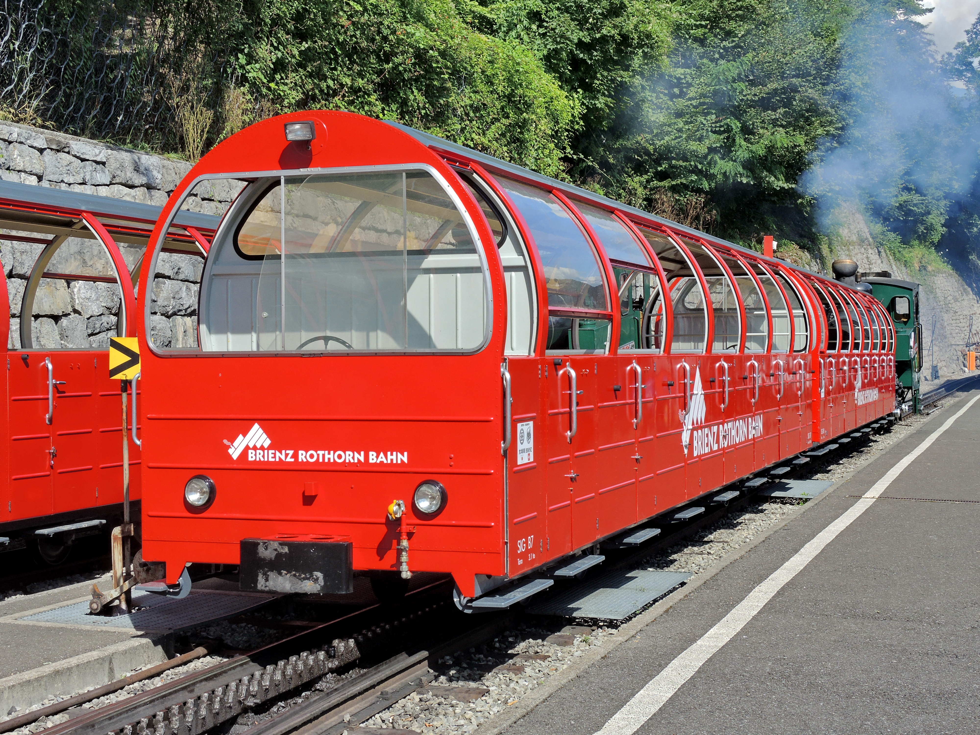 Brienz Rothhorn Bahn (BRB) at Brienz BRB train station (Switzerland)